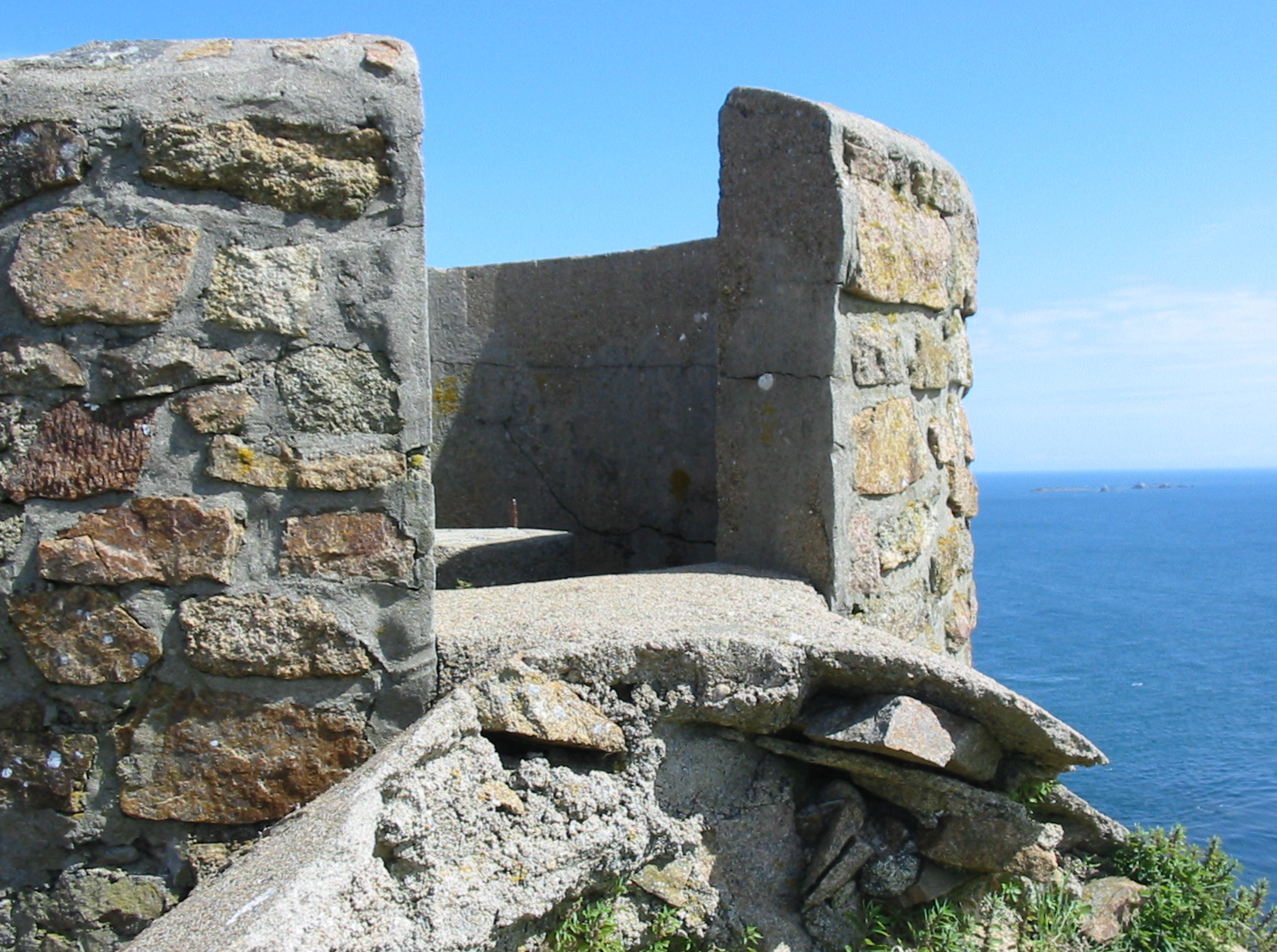 Nrf: Saint Ouën, Jèrri, 5 d'Juilet 2009